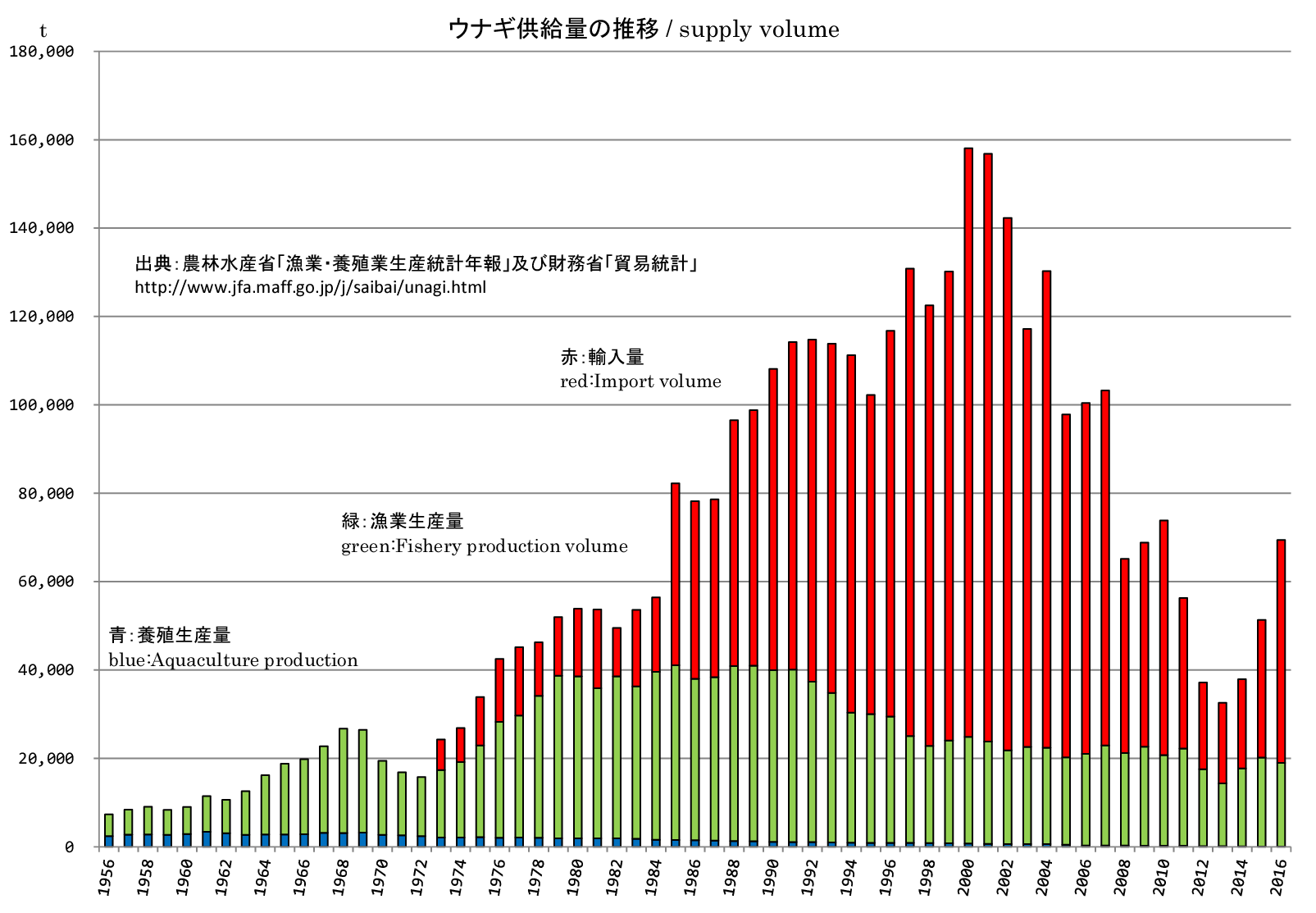 ウナギ供給量の推移グラフ。出典：水産庁「ウナギに関する情報」 url =